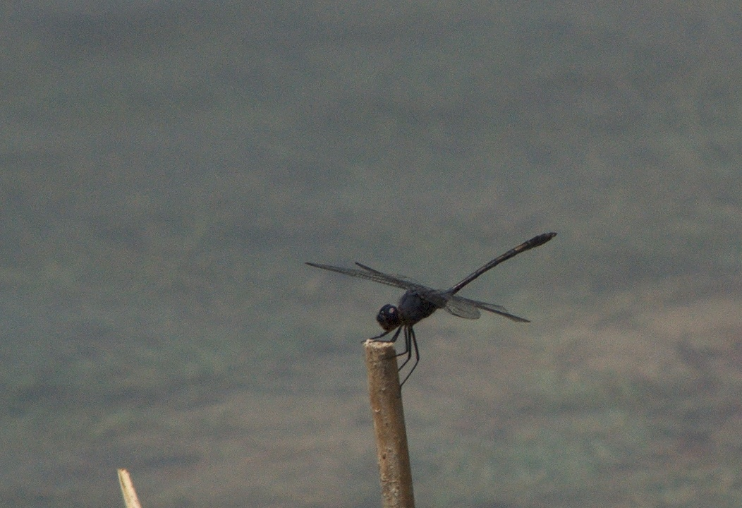 Salineno, Texas.